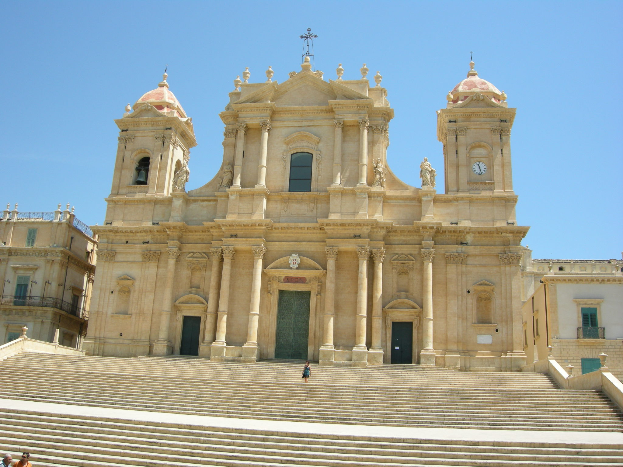 Noto, duomo